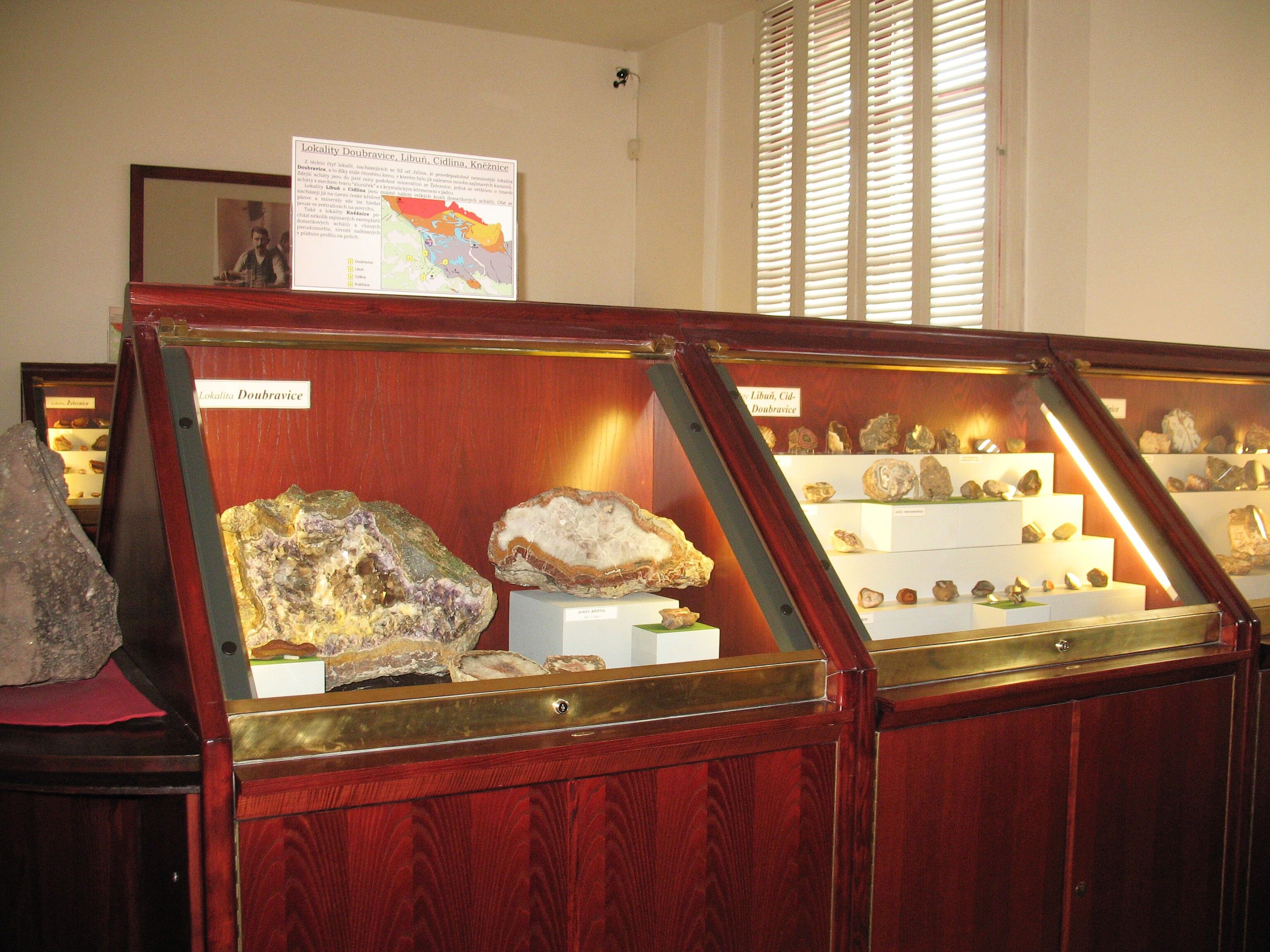 Z expozice drahých kamenů v prvním poschodí Klenotnice - acháty z Doubravice, Libuně, Cidliny a Kněžnice